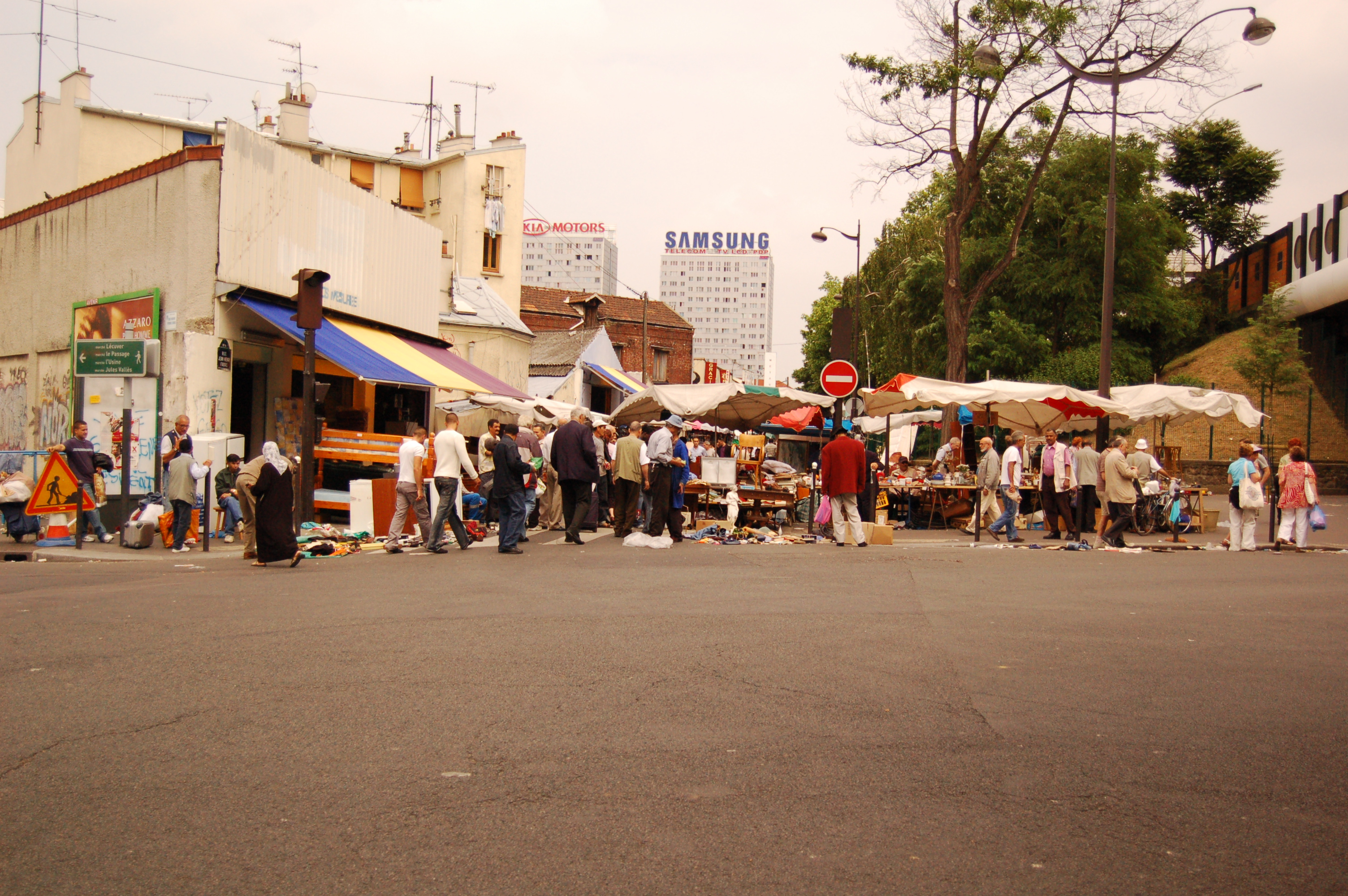 Entrée des puces de Saint-Ouen côtés porte de Montmartre